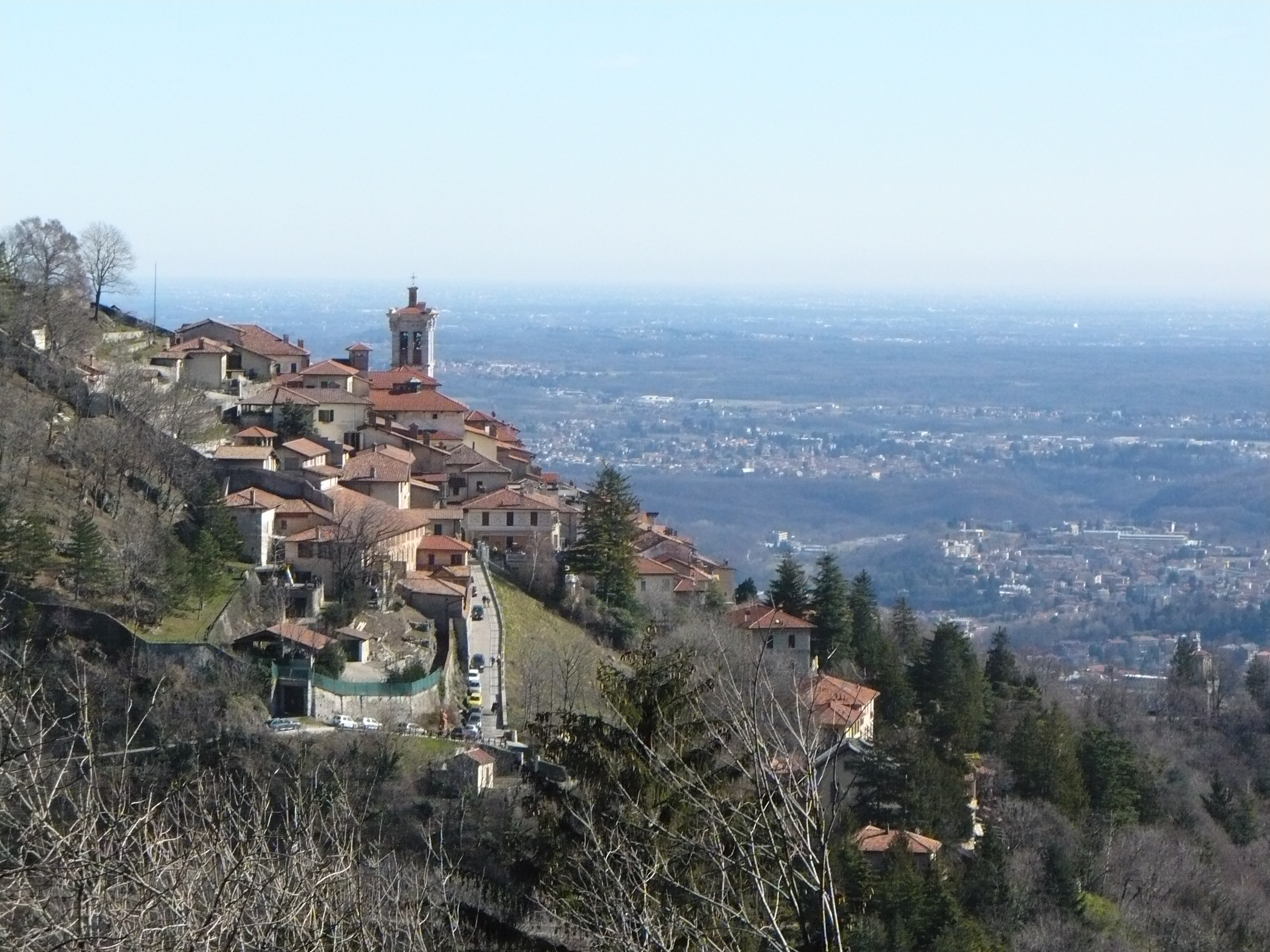 Sacro Monte del Rosario di Varese fotografato dal Campo dei Fiori